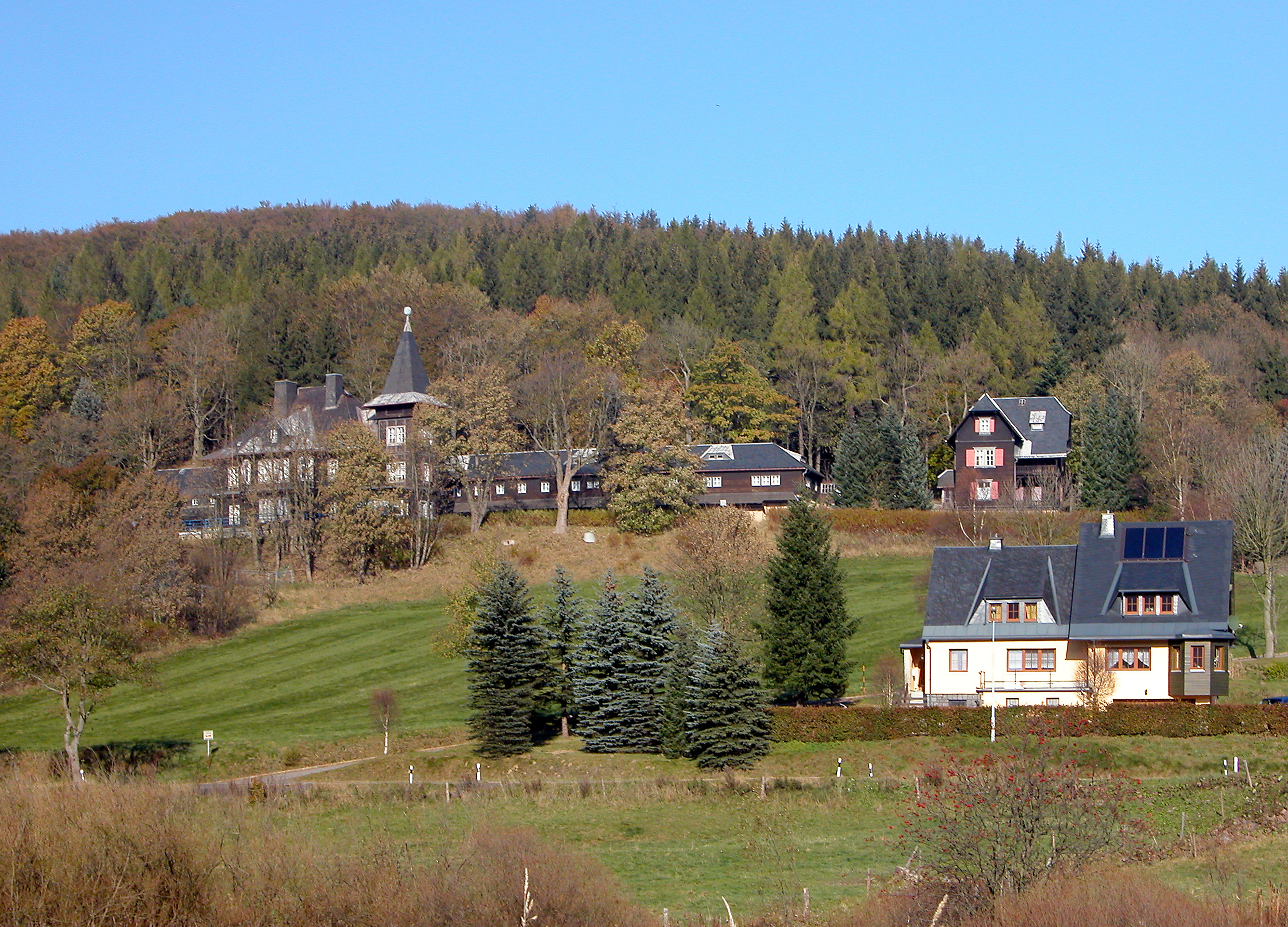 22.10.2011 01773 Rehefeld-Zaunhaus (Altenberg Sachs.): Jagdschloß Rehefeld, Talstraße 1 (GMP: 50.730679,13.701536). Die Schloßanlage war 1869 ein Geschenk der Kronprinzessin Carola von Sachsen an ihren Ehemann, den Kronprinzen Albert von Sachsen. Ab 1824 im Besitz der Dresdner Freimaurerloge, die sich 1933 gezwungen sah, das Jagdschloss an die Frontkämpferorganisation Stahlhelm zu verpachten. Ab 1935 als Pension im Besitz von Prinz Friedrich Christian von Sachsen. 1937 Umbau nach den Plänen des Architekten Ulrich und des Kunstmalers Heinrich Bickel zum Jagdhotel. Ab 1942 Reservelazarett der Wehrmacht. In der DDR-Zeit Ferienheim. Nach der Wende zunächst Fortbildungs- und Tagungsstätte der Landes- Polizeischule Sachsen. 2012 privatisiert. Hier die Sicht aus dem Ort von Süden. [DSCNn2937.TIF]20111022200DR.JPG(c)Blobelt